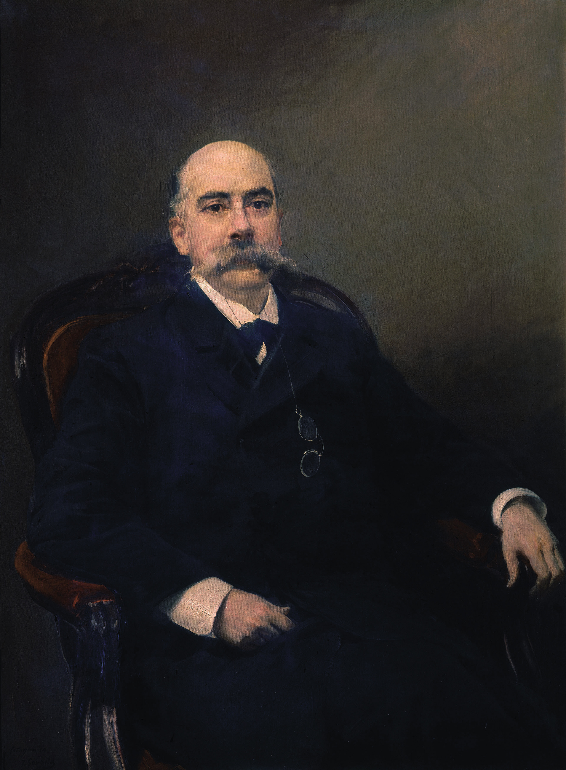 Retrato del politico republicano español Emilio Castelar (1832-1899), que llegó a ser uno de los cuatro presidentes de la Primera República Española.